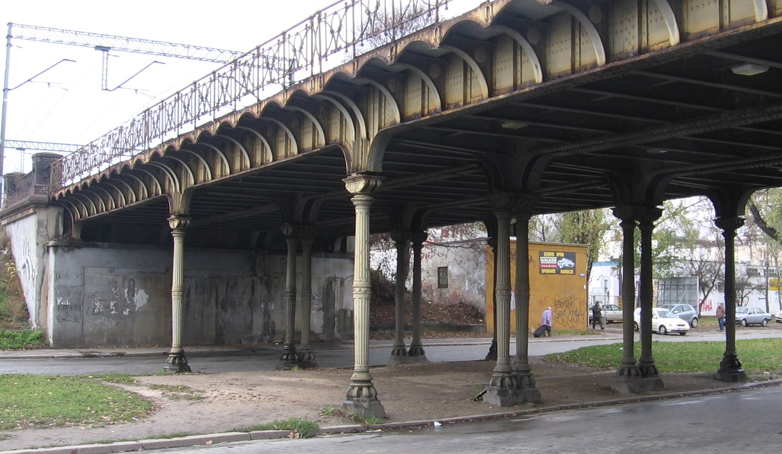 Wiadukt kolejowy z filarami Hartunga we Wrocławiu nad ulicą Zaporoską.